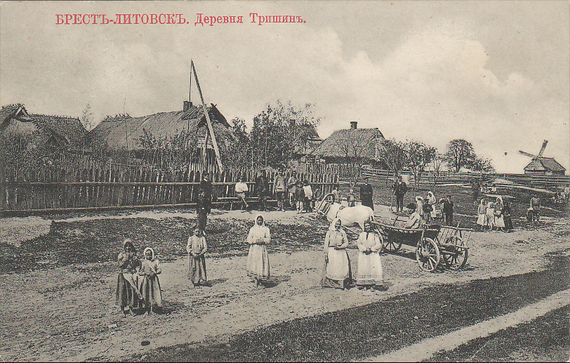 Беларуская (тарашкевіца): Берасьце (Bieraście), Трышын (Tryšyn)